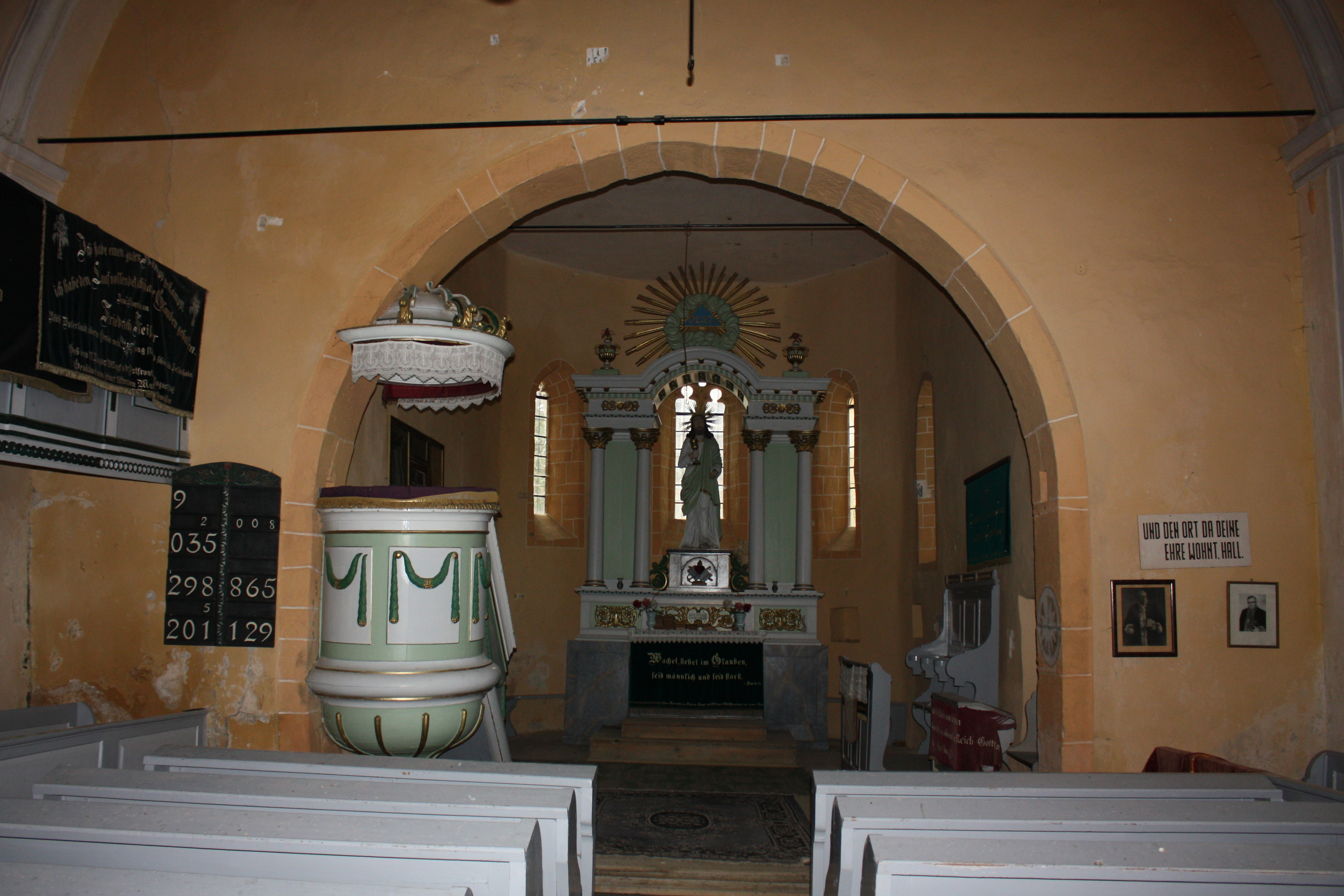 Evangélikus templomRomână: Biserica evanghelică 01